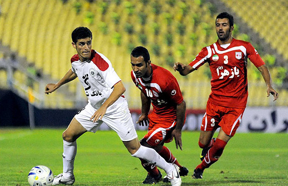 تصویری از دیدار شهرداری تبریز و تراکتورسازی در سال ۱۳۹۰